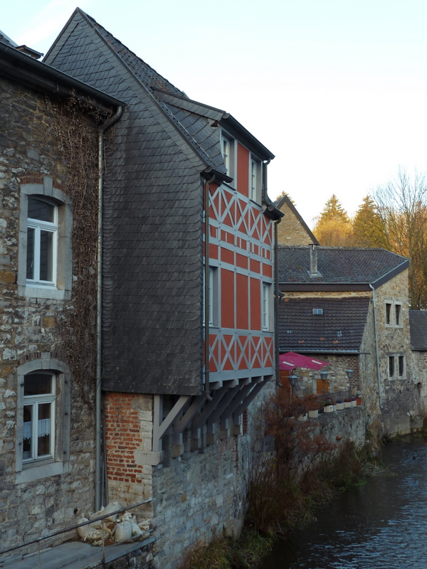 An der Inde